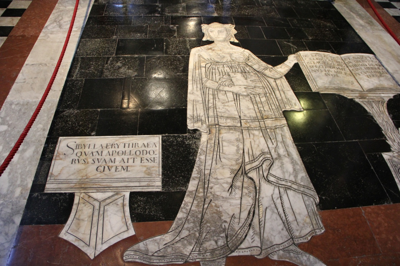 Dessinée par Antonio Federighi. Entre 1481-1483